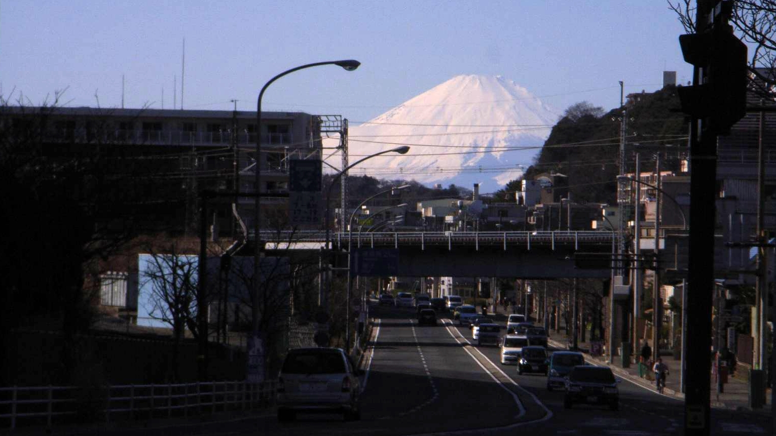 間門からの富士山